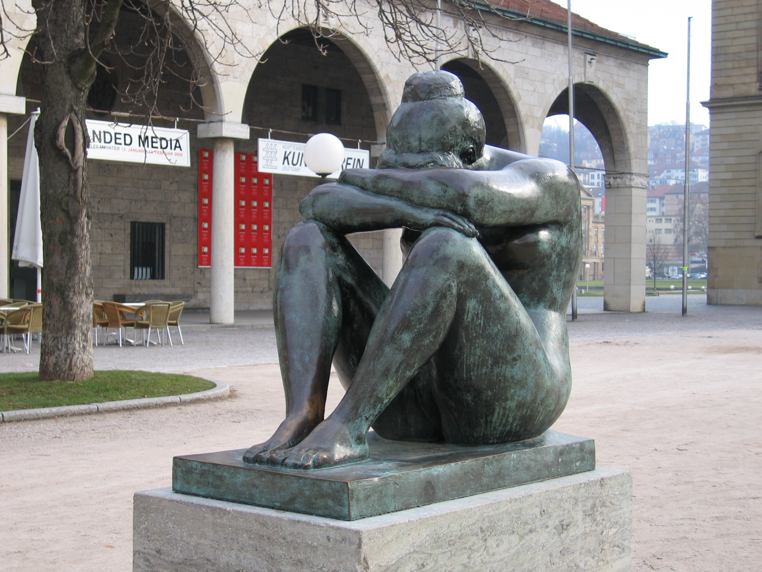 Beeld in Stuttgart, Germany - Eigen foto